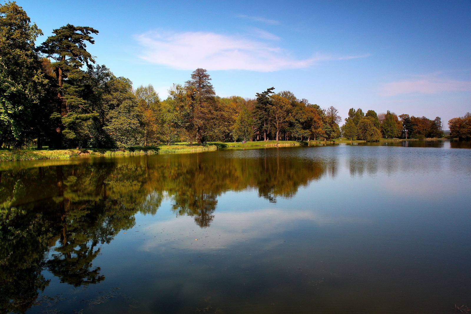 Jezioro w Parku w Świerklańcu